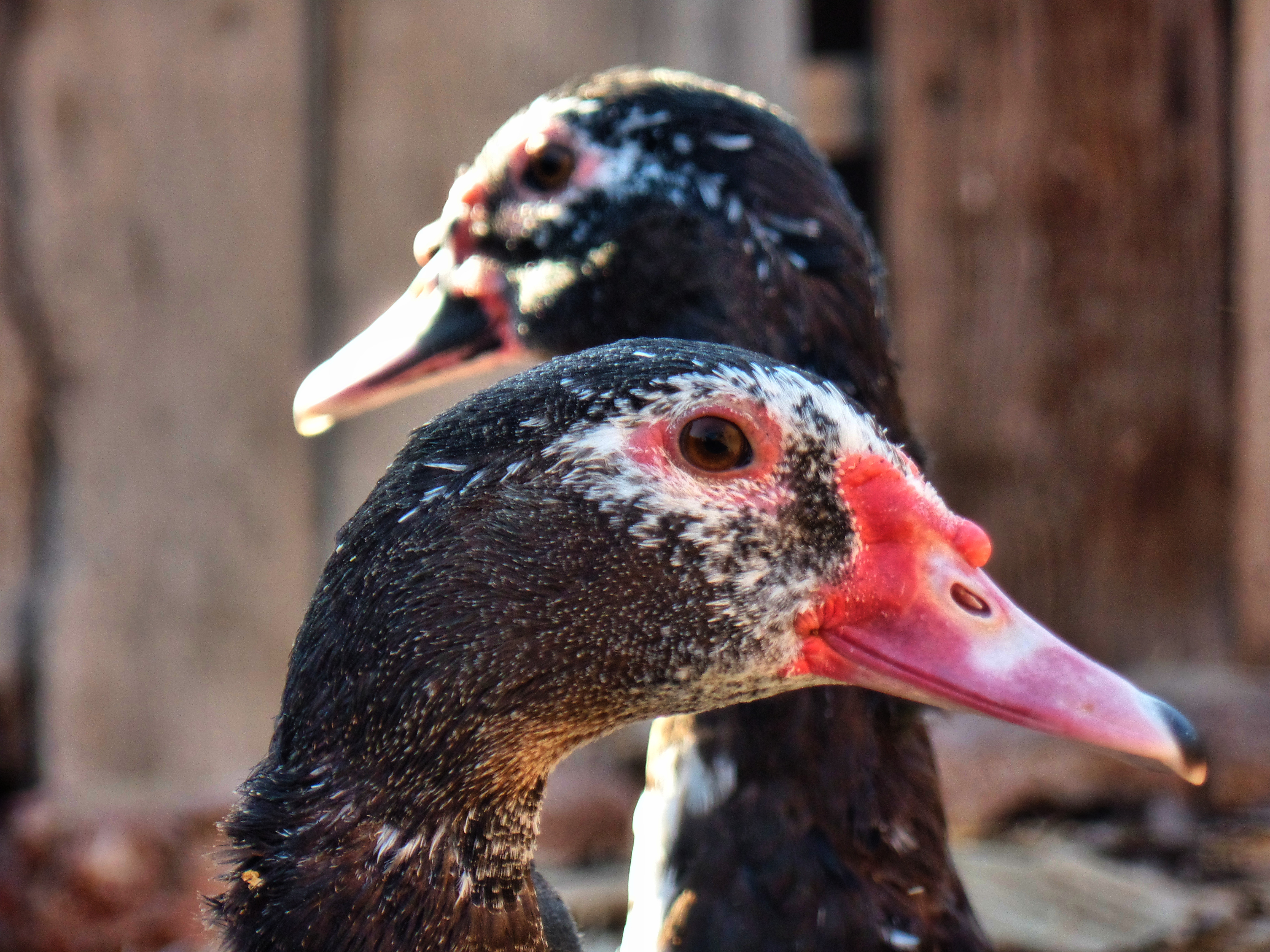 يعد البط من اكثر الطيور انتشارا فى مصر وفى القرى بالاخص